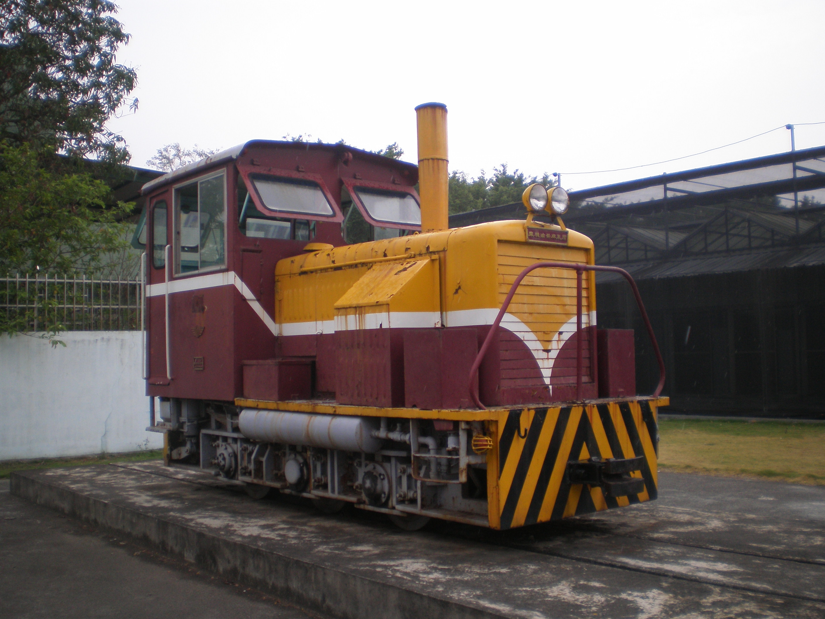 靜態保存於南靖糖廠的53號順風牌機車